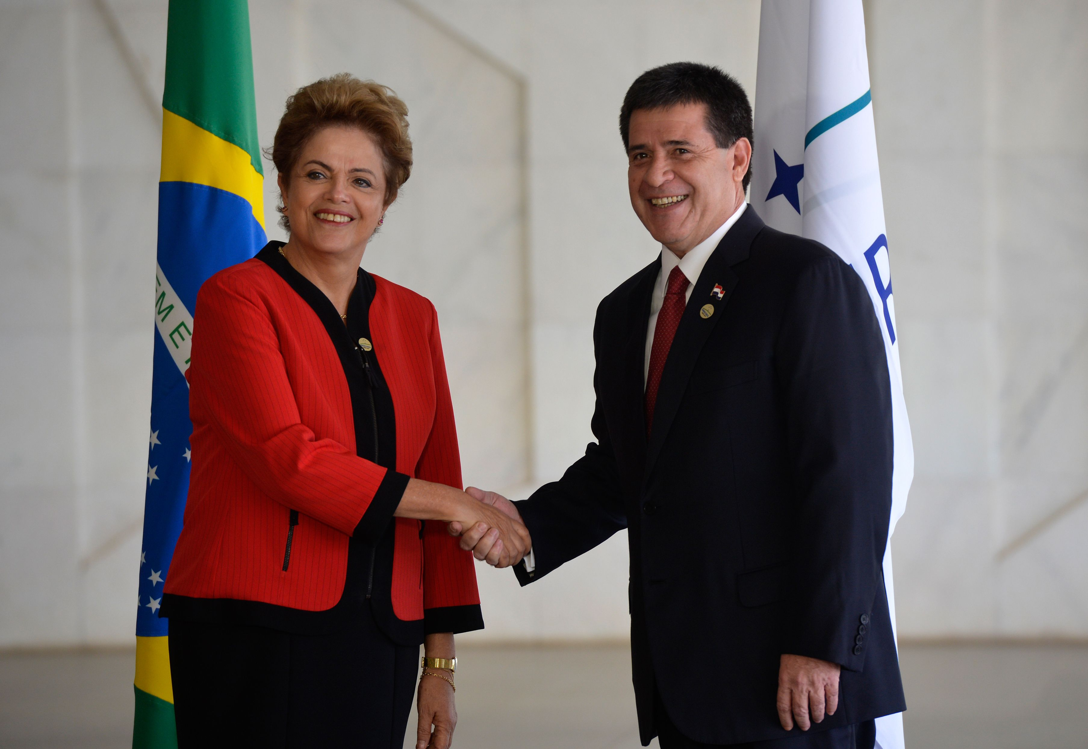 Na 48ª Cúpula dos Chefes de Estado do Mercosul e Estados Associados, a presidenta Dilma Rousseff recebe o presidente do Paraguai Horacio Cartes.